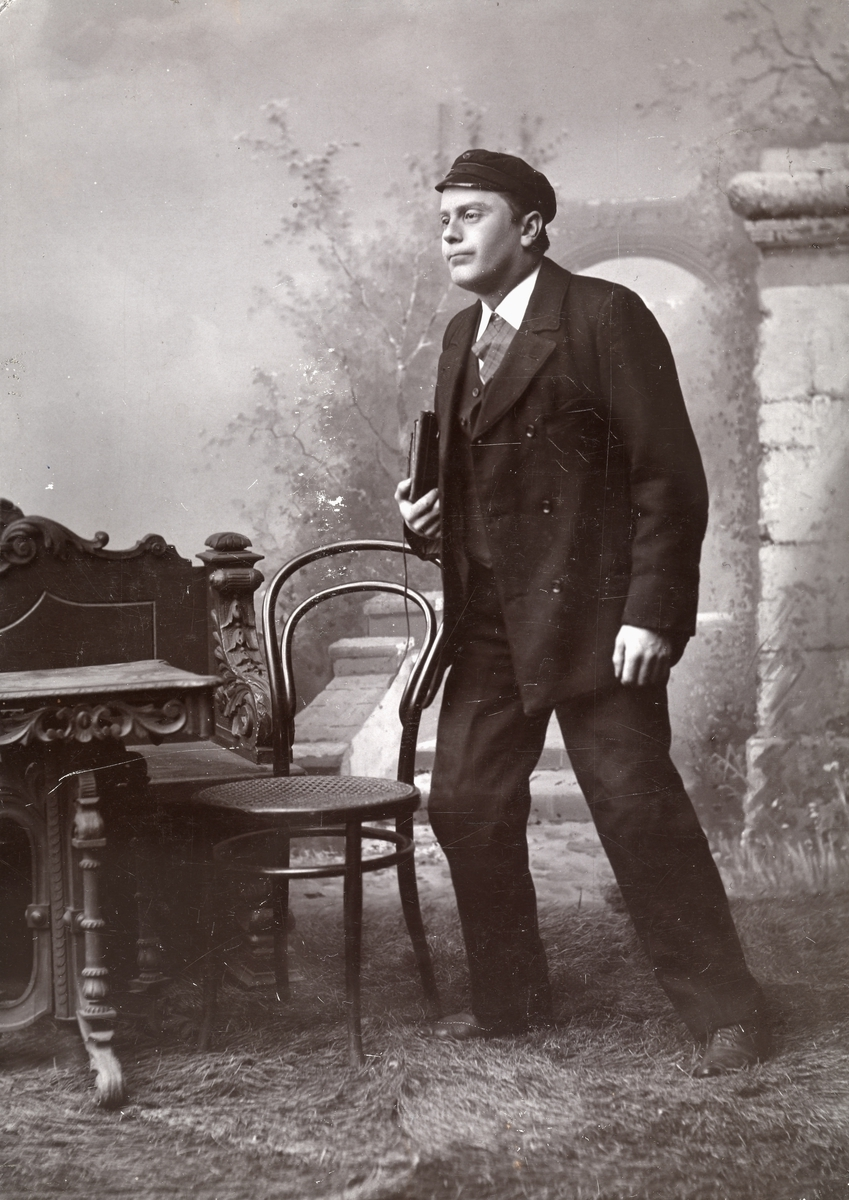 I rollen som bondestudent Neland i Has Lindeland (1898).